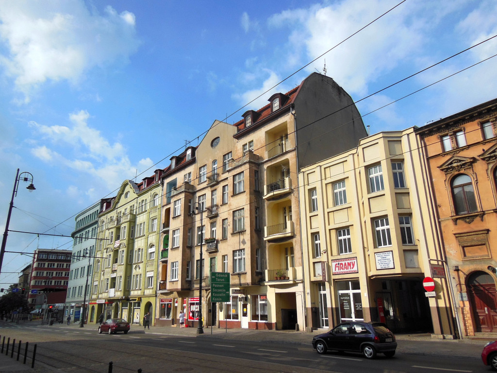 Ulica Dworcowa w Bydgoszczy na odcinku od ul. Królowej Jadwigi do dworca PKP